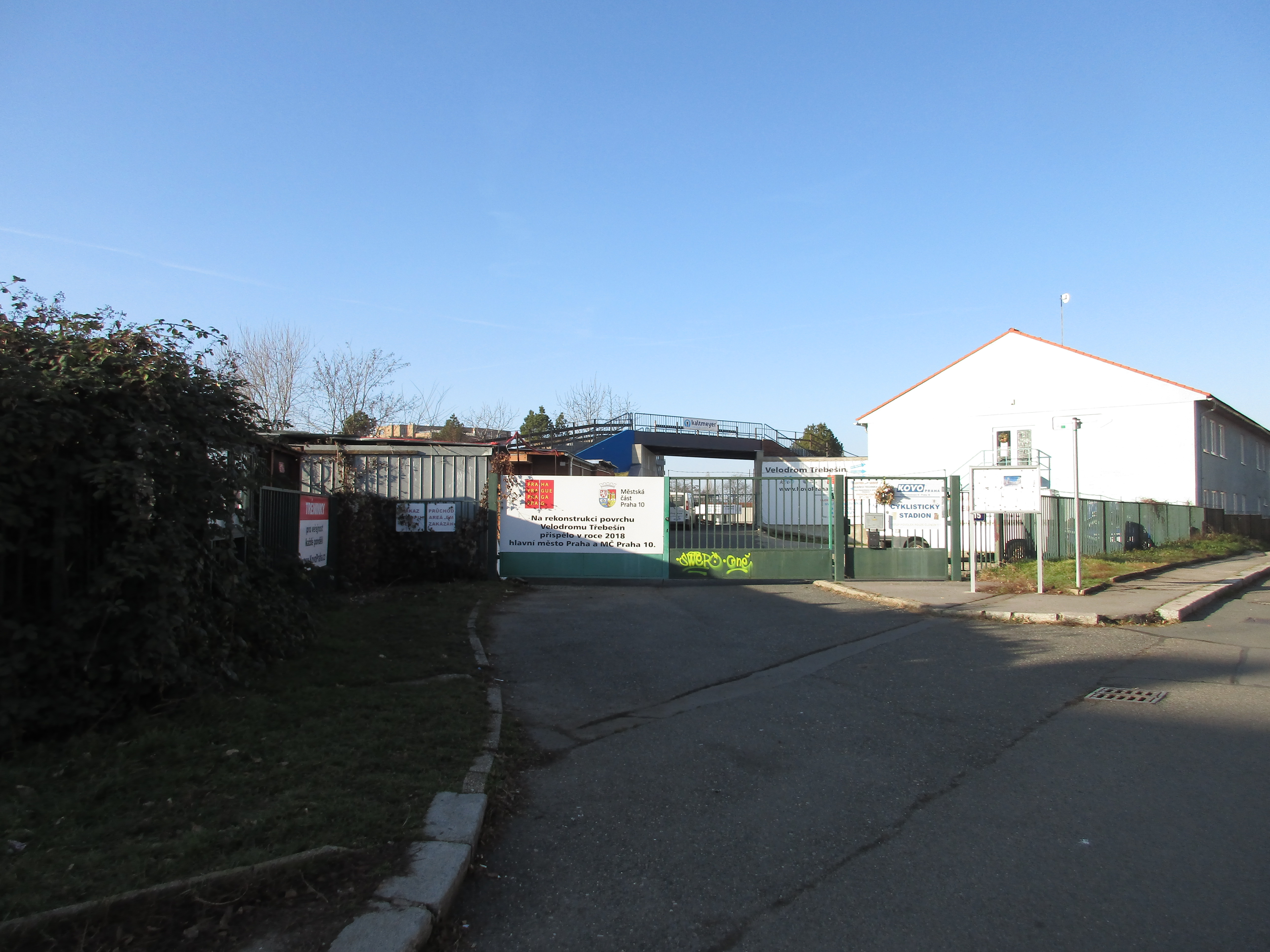 Velodrom Třebešín. Nad Kapličkou 3324/15, Praha 10-Strašnice.